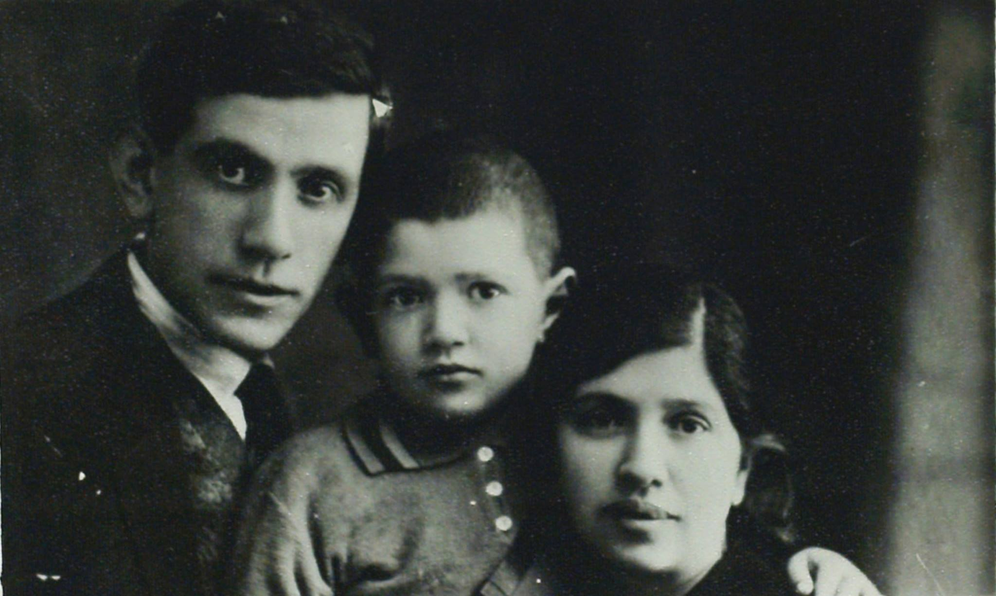 Майсей (Мойшэ) Кульбак, яўрэйскі пісьменнік, драматург, перакладчык. З жонкай і сынам у 1930 годзе.